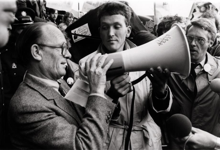 Minister Rietkerk spreekt met een megafoon actievoerders toe die protesteren tegen korting op hun salarissen bij de opening van een nieuw politiebureau. Nederland, Utrecht, 31 oktober 1983.